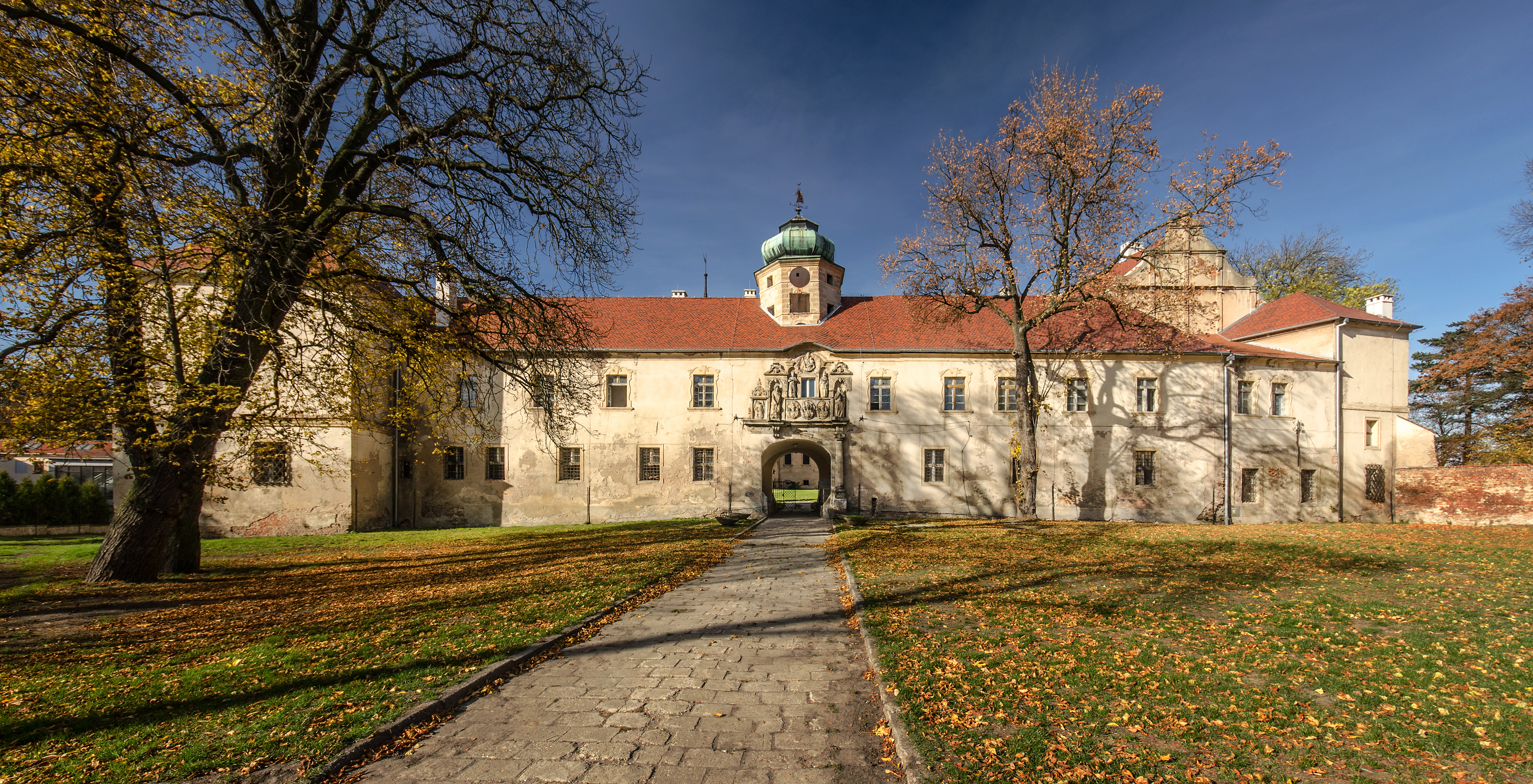 Głogówek, zamek górny i dolny, XVI, XIX w.